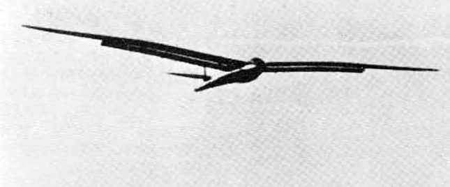 Szybowiec B-38 w locie